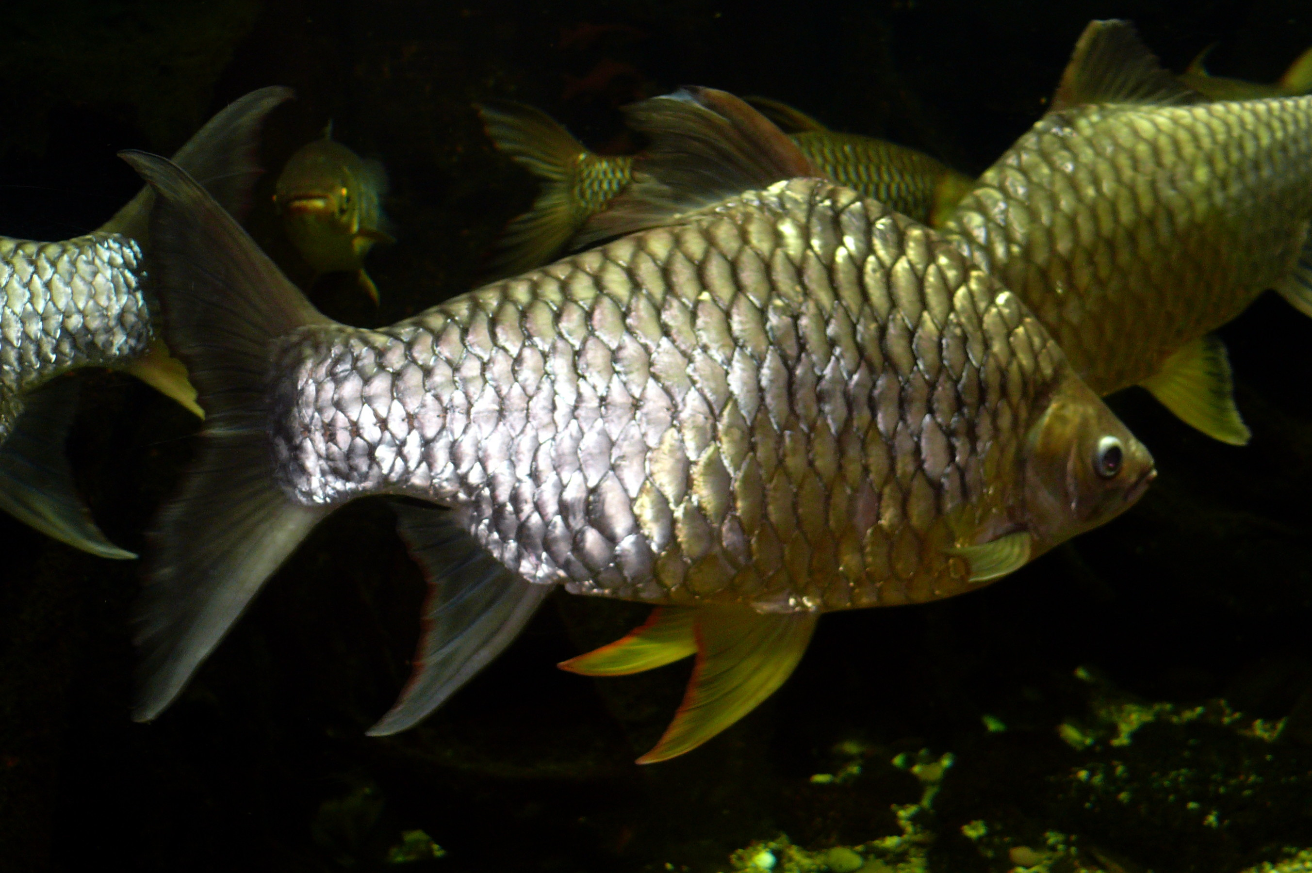 Wetmors Barbe (Hypsibarbus wetmorei)